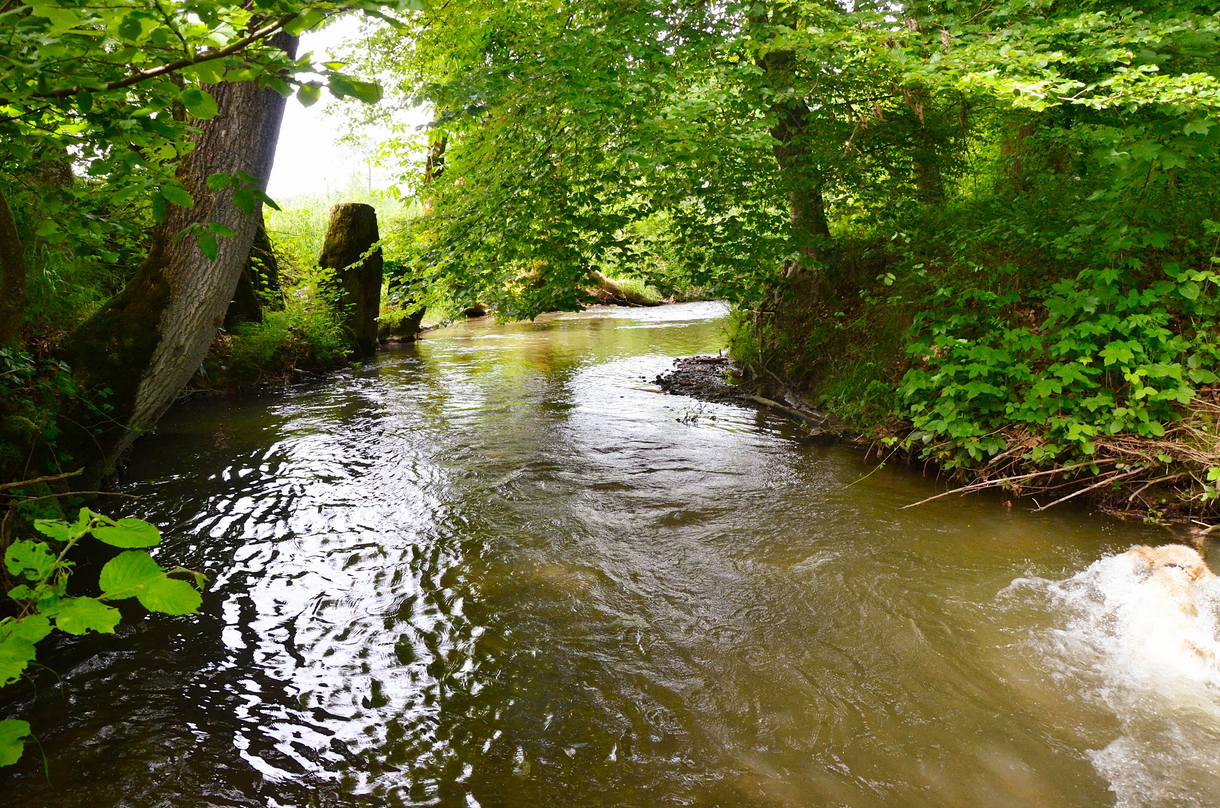 Der Chandon bei Chandossel